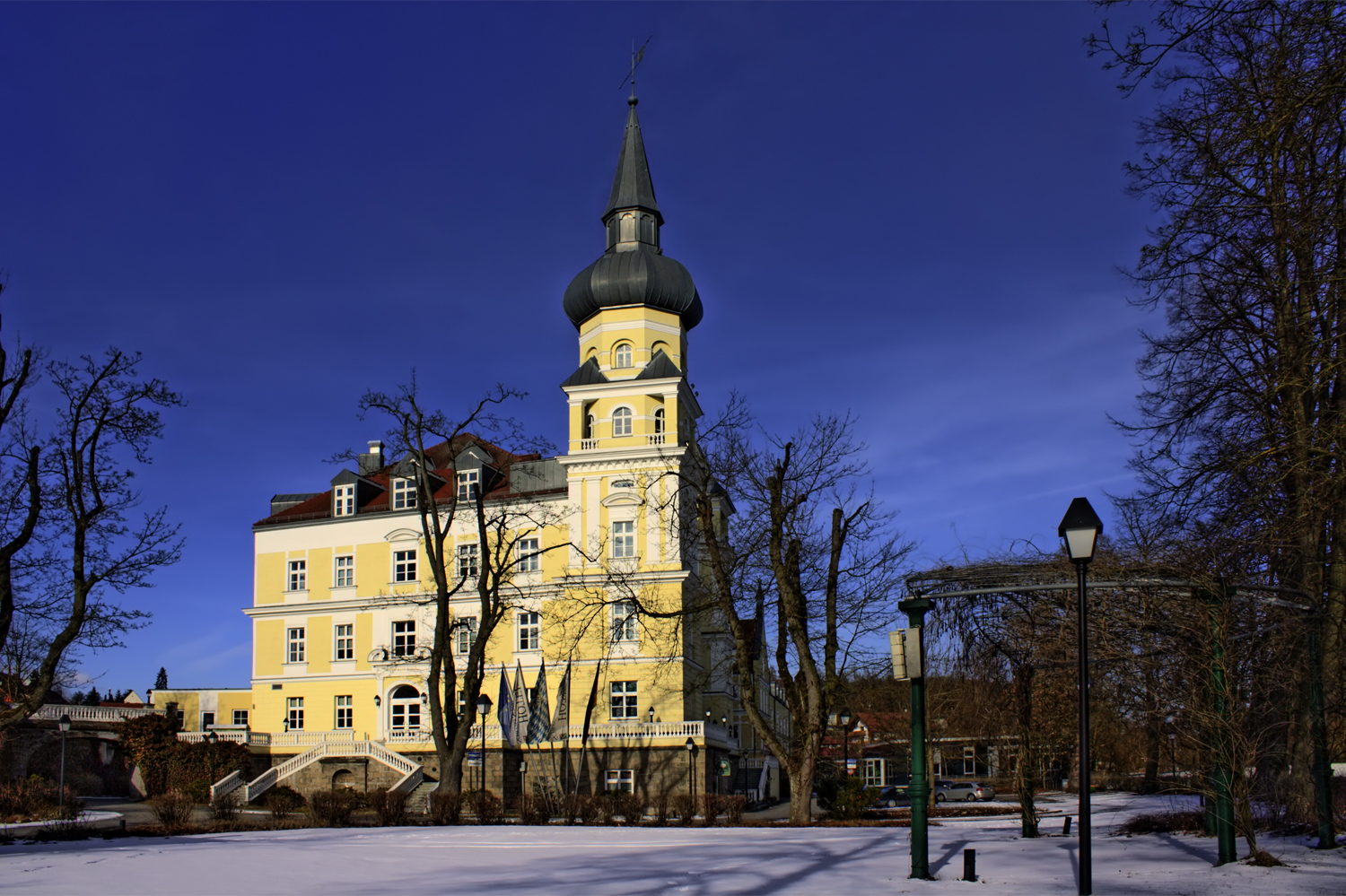 Schloss Schwarzenfeld von Süden fotografiert